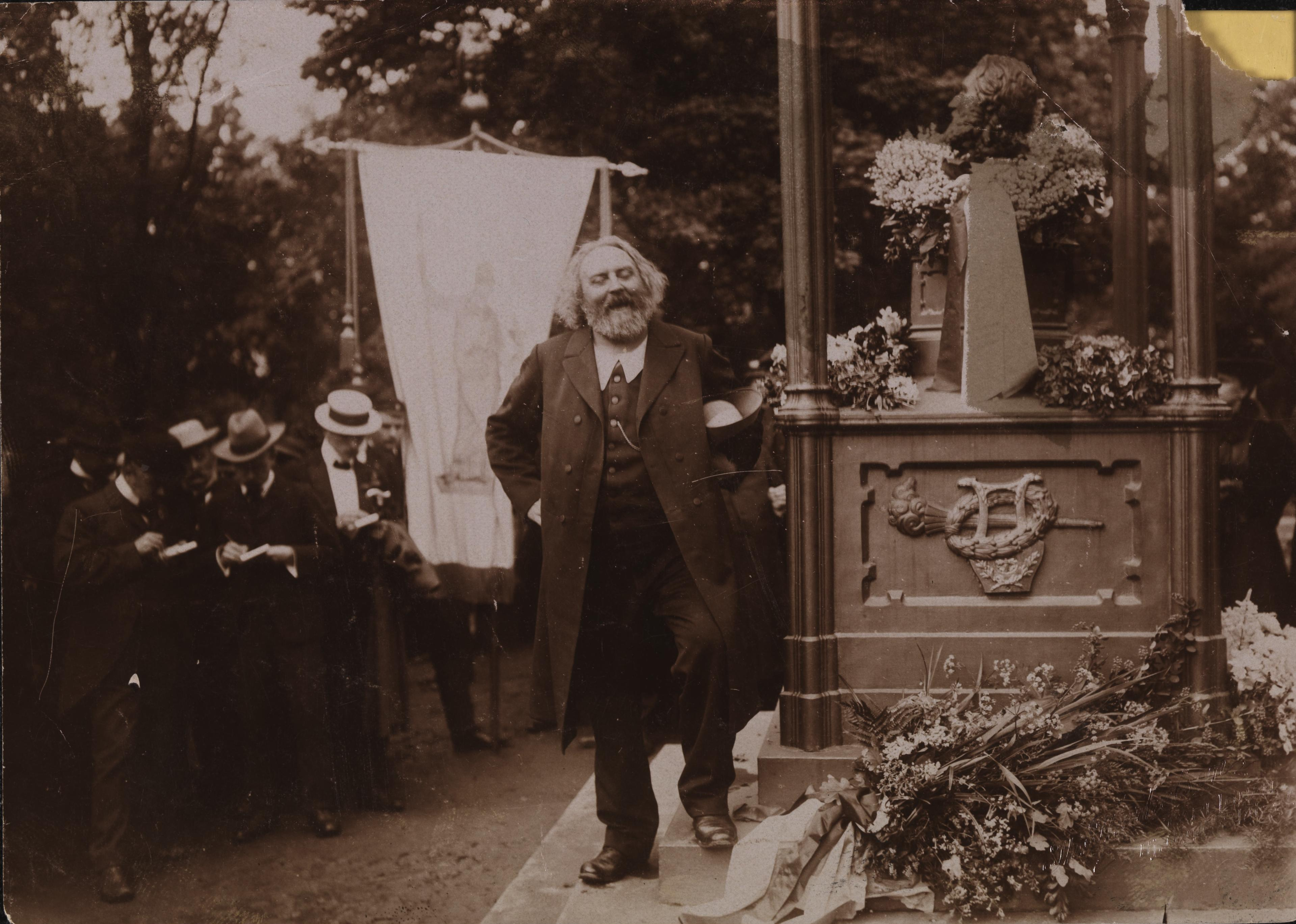 Bildet er hentet fra Nasjonalbibliotekets bildesamling. Anmerkninger til bildet var: Tittel hentet fra påskrift på komponentnr 1 St. Hanshaugen, Oslo, Oslo